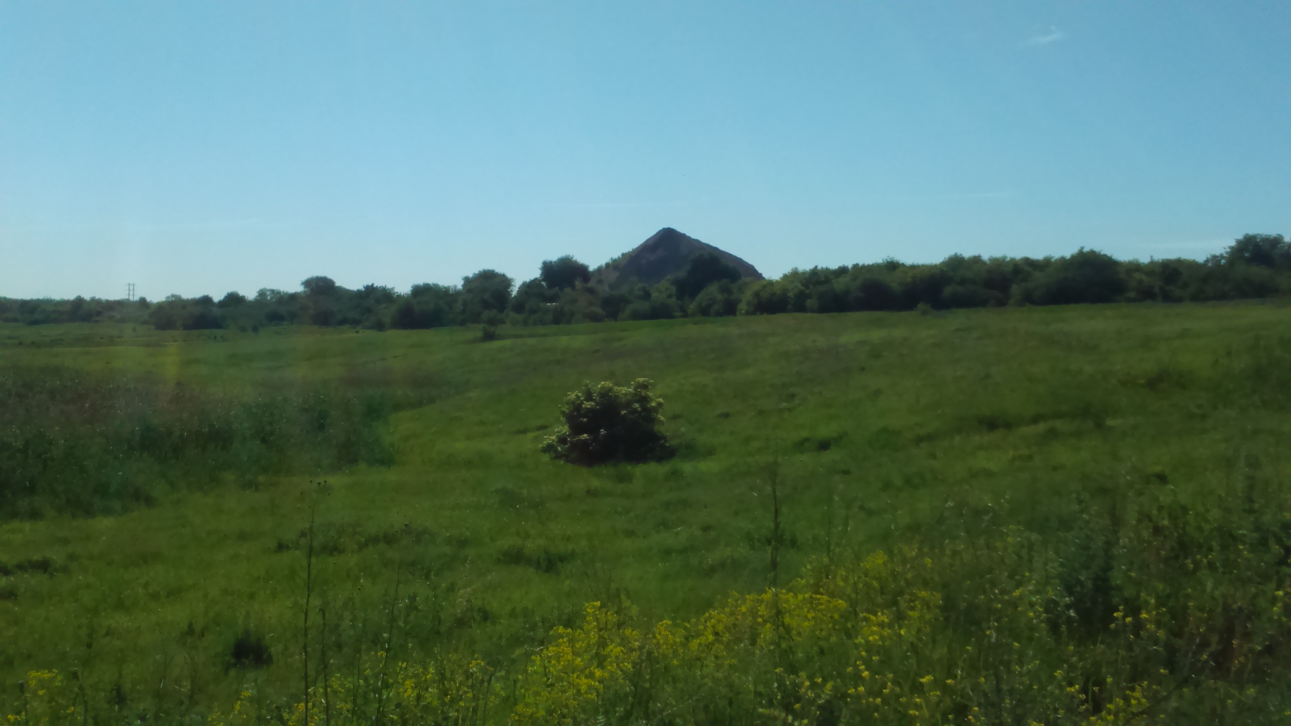 Красноярське — селище в Україні, Добропільському районі Донецької області.